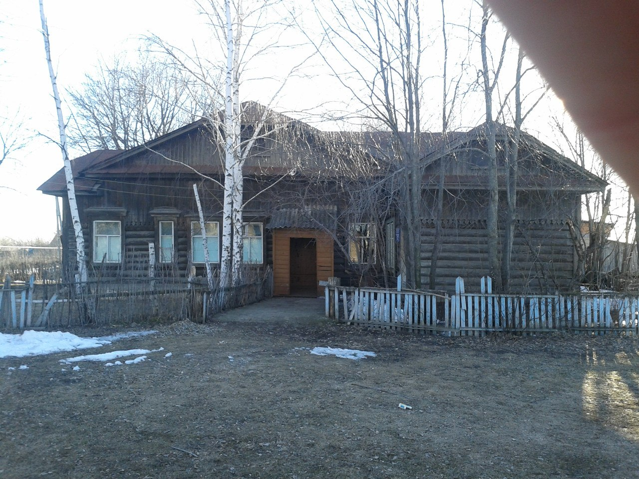 Чув. Сусканская школа. 1 корпус